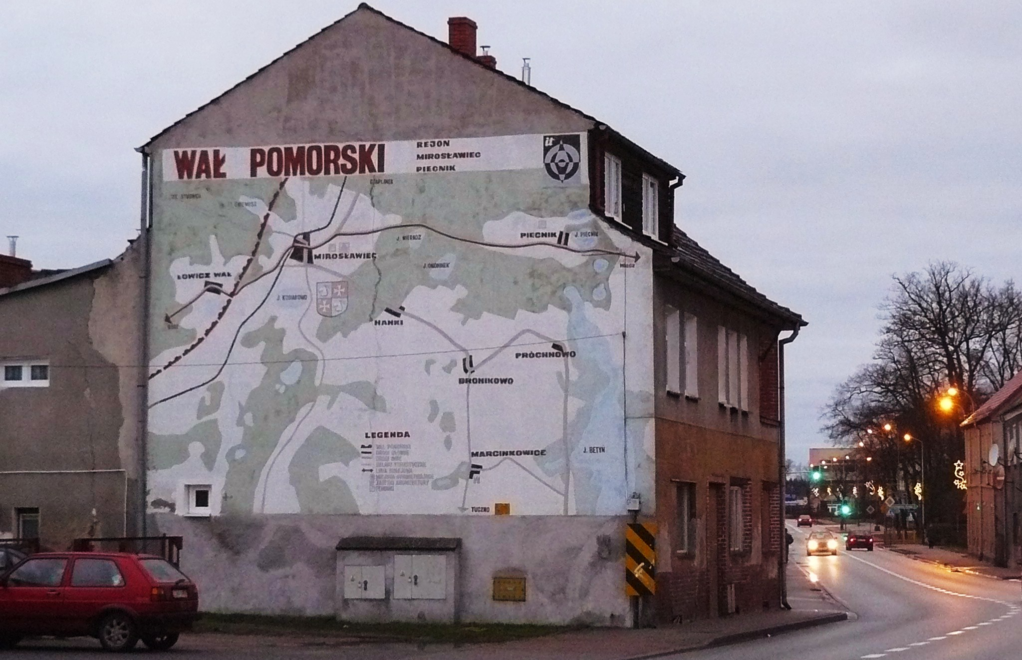 Mirosławiec, mural z okresu PRL.